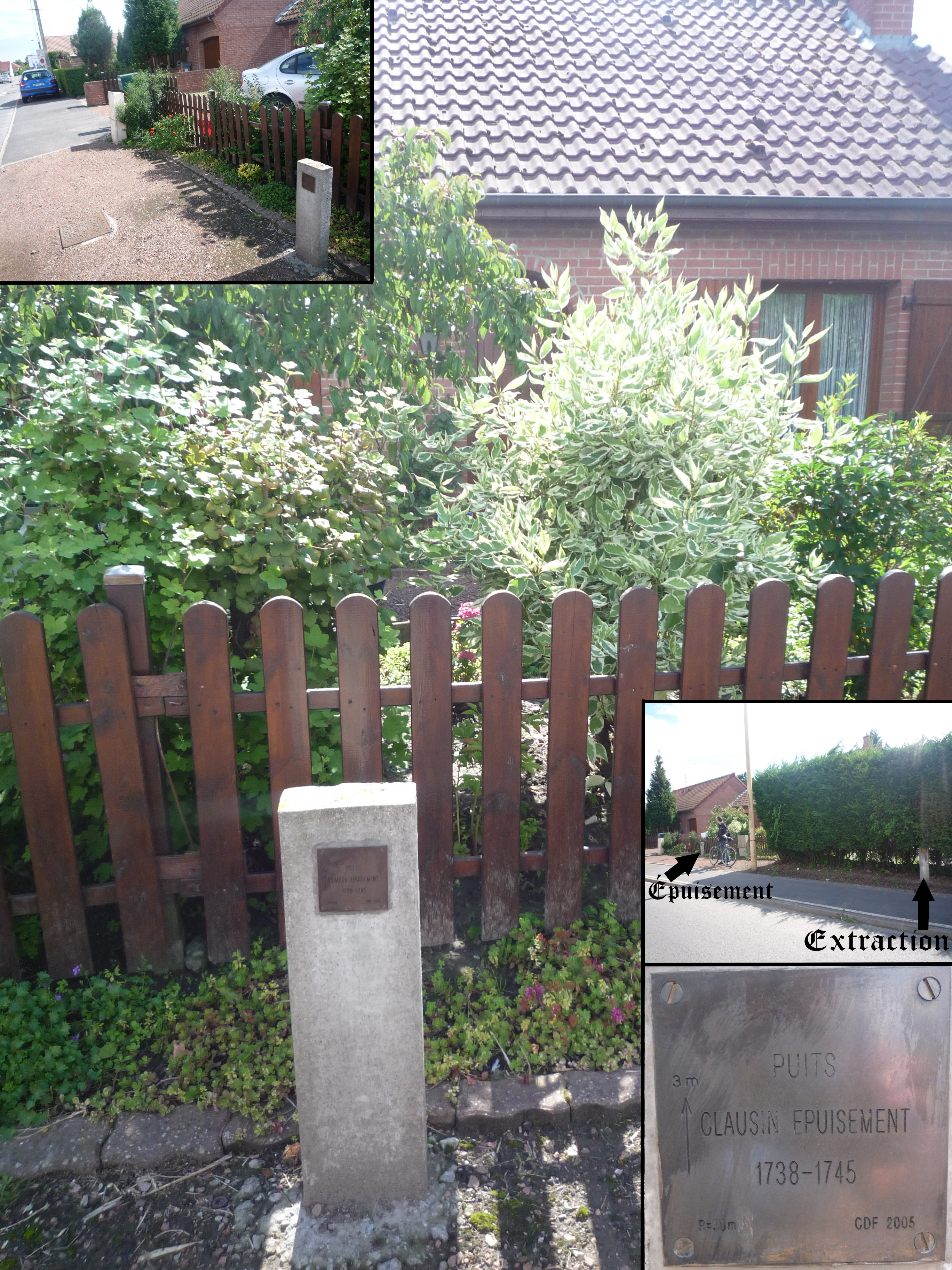 Puits Clausin Épuisement de la Compagnie des mines d'Anzin à Fresnes-sur-Escaut, Nord, Nord-Pas-de-Calais, France.